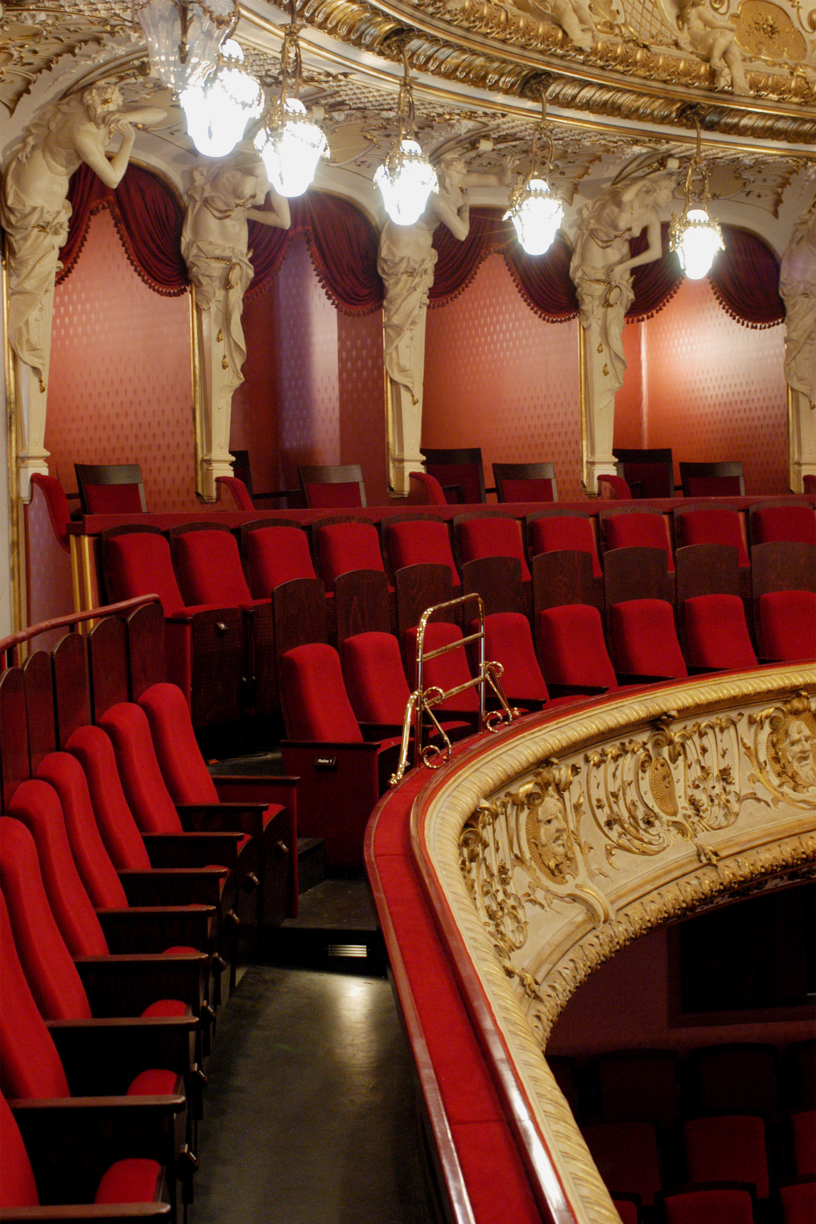 Hessisches Staatstheater Wiesbaden